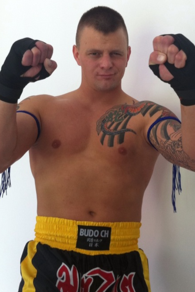 Daniel Bossard nach dem Muay Thai Training